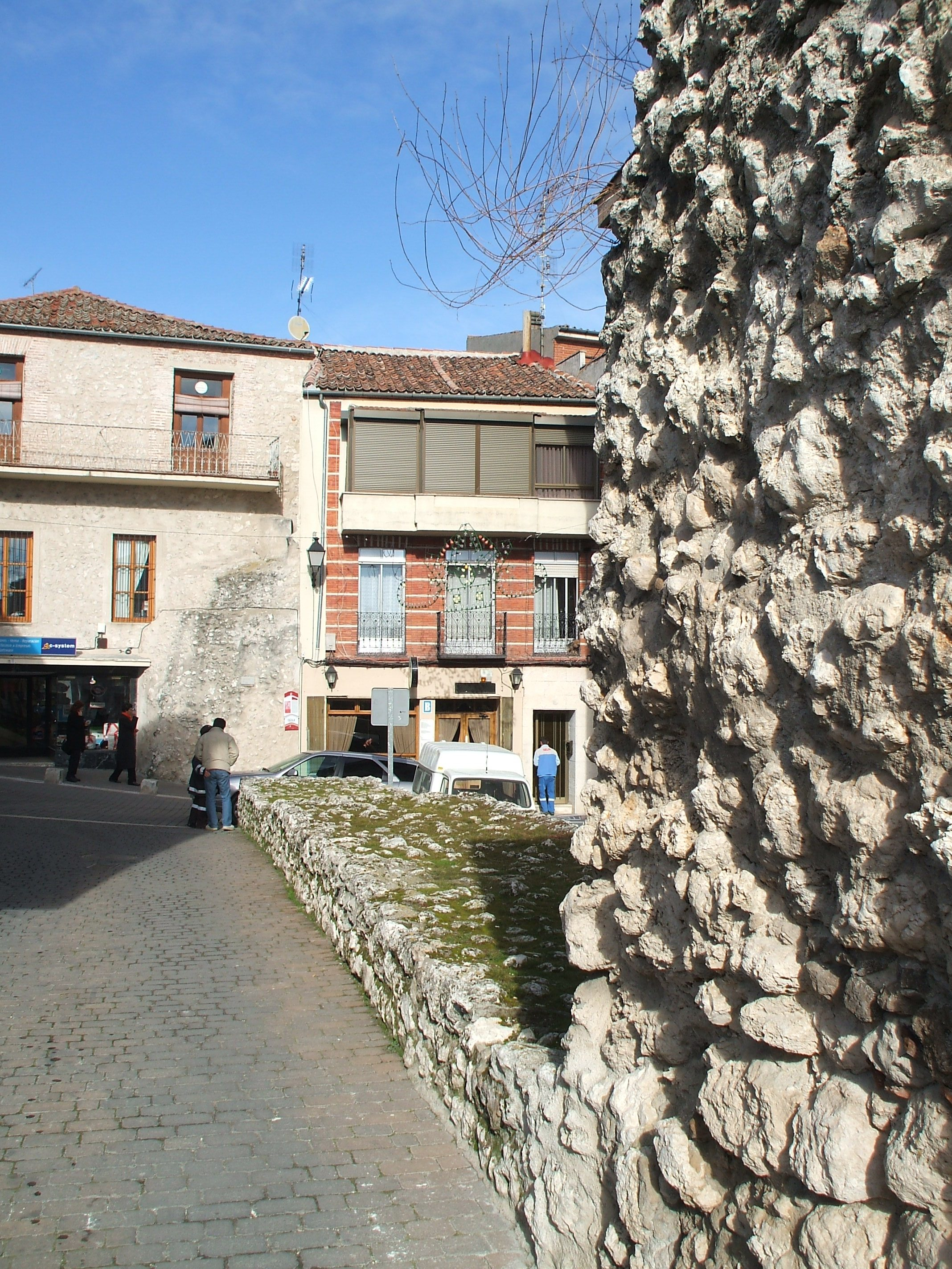 Tramo de muralla que cerraba con el arco de Carchena, del que puede observarse parte de uno de sus torreones al final del trayecto, adosado a los edificios (Cuéllar).